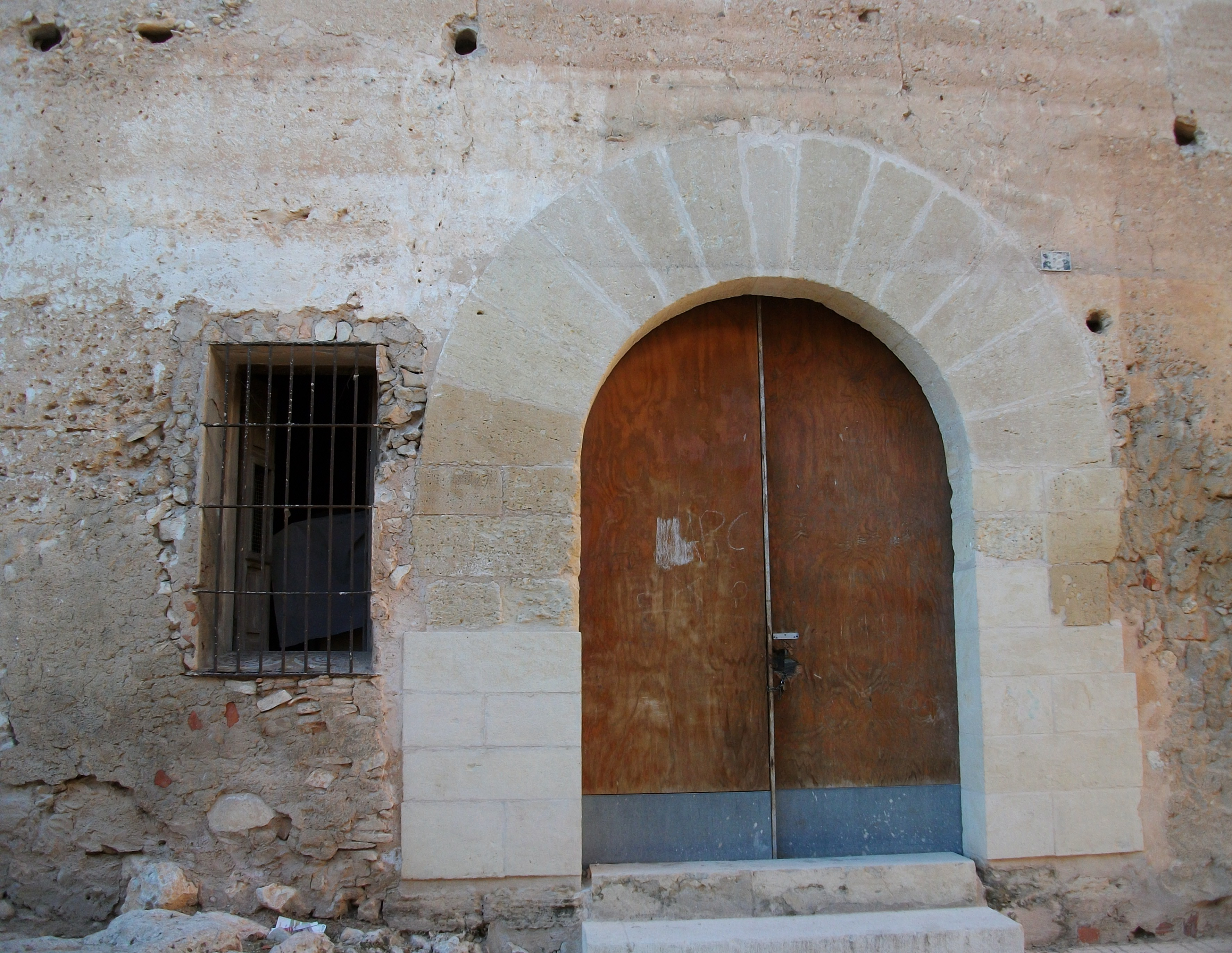 Portada del palau de Llutxent.